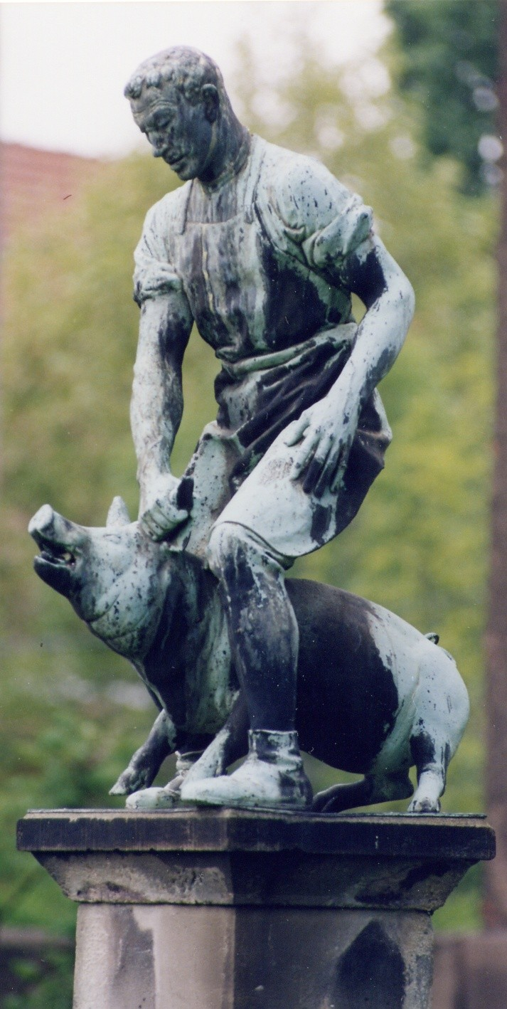 Dresdner Vieh- und Schlachthof, Plastik Schweinetreiber (Alexander Höfer 1877-1937)